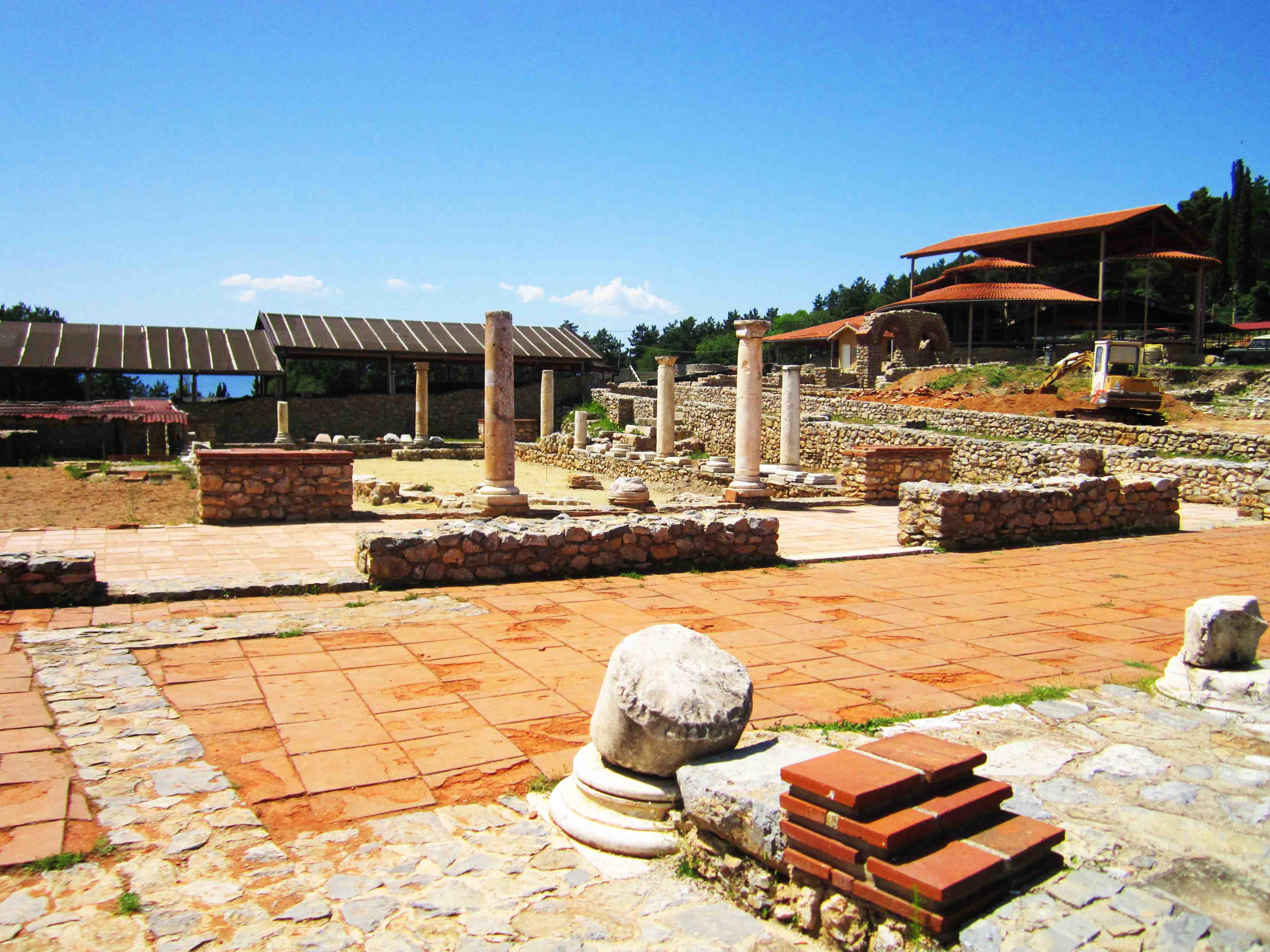 Поглед кон Плаошник и археолошките ископини , Охрид